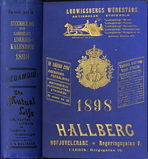 Stockholms adresskalender för 1898 (pärm)